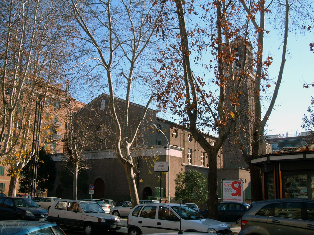 Chiesa di San Giovanni Battista de Rossi, a Roma, nel quartiere Appio Latino.